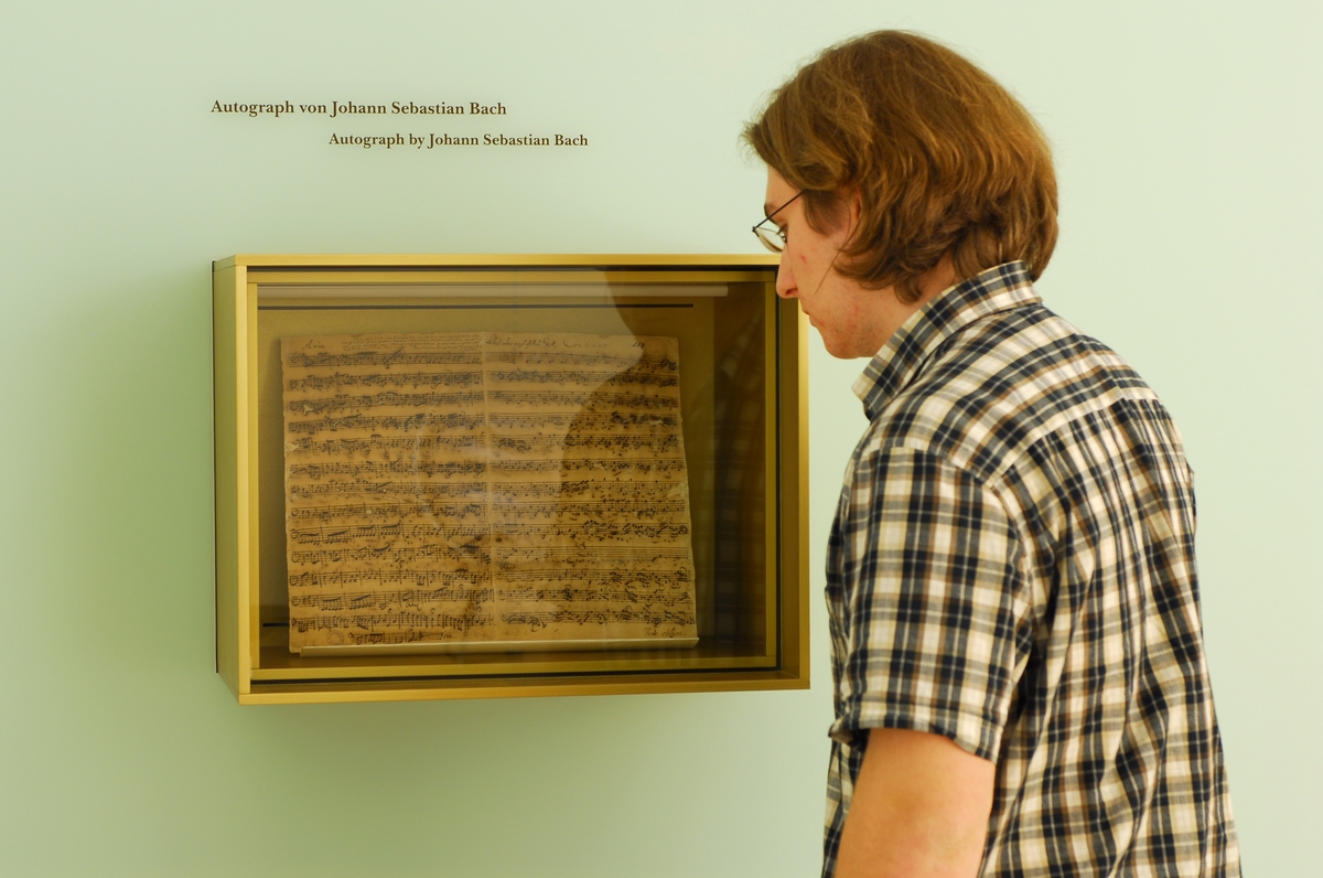 Bach-Autograph im Bachhaus Eisenach